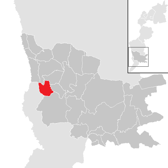 Bezirk Güssing